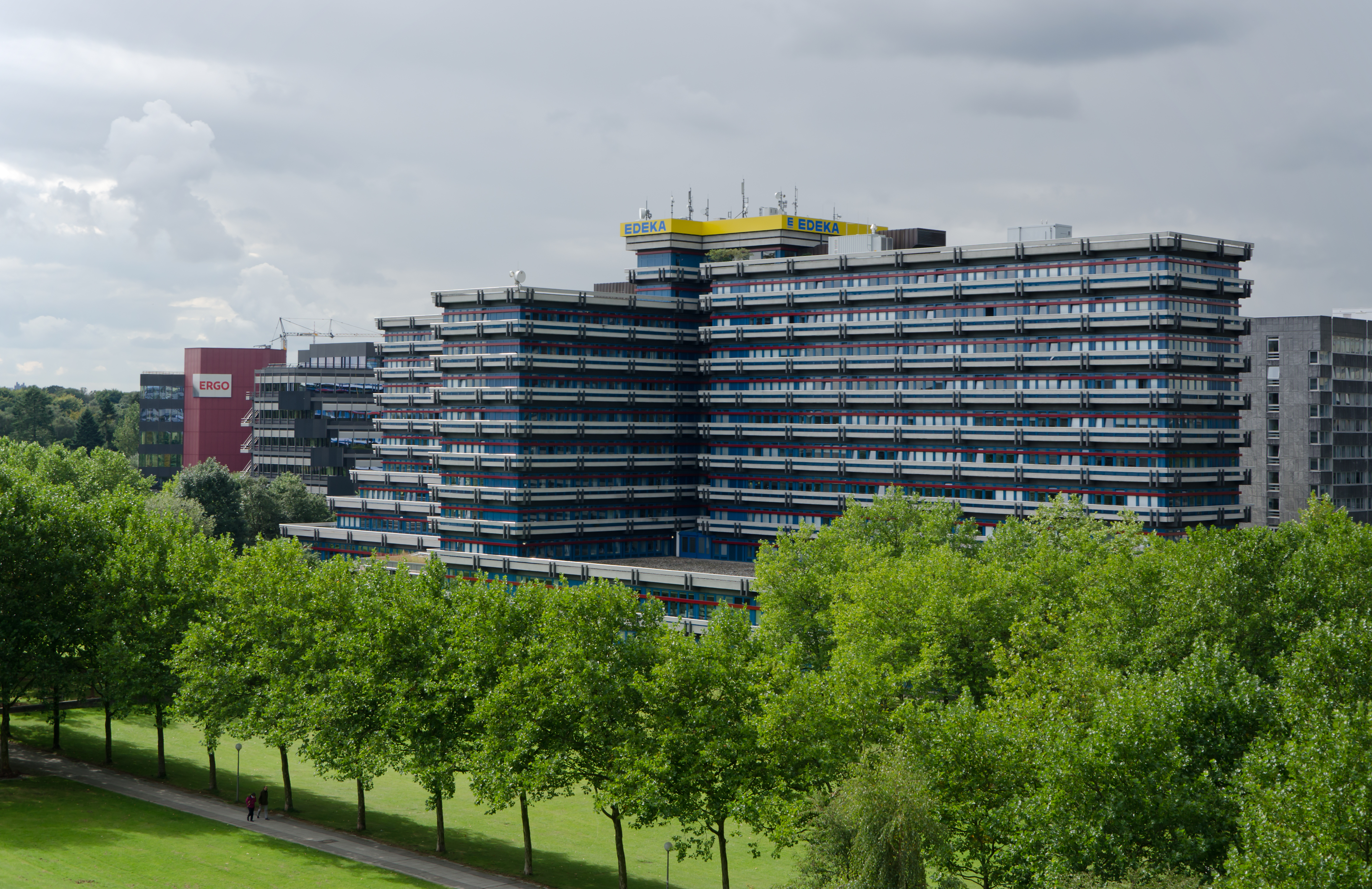 Edekazentrale in der Hamburger City Nord